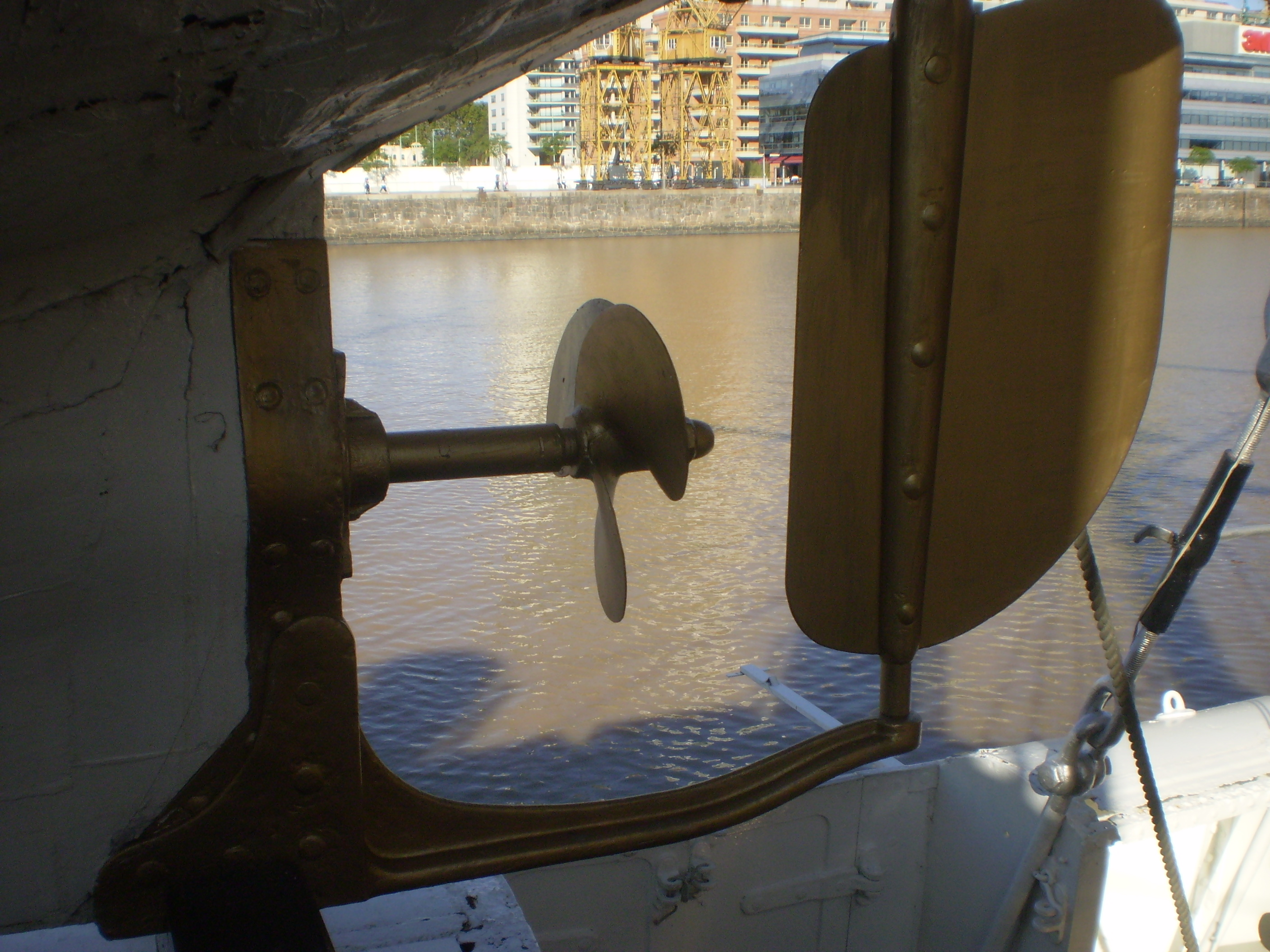 Buque Museo Fragata A.R.A. Presidente Sarmiento, amarrada en puerto Madero, Buenos Aires, Argentina